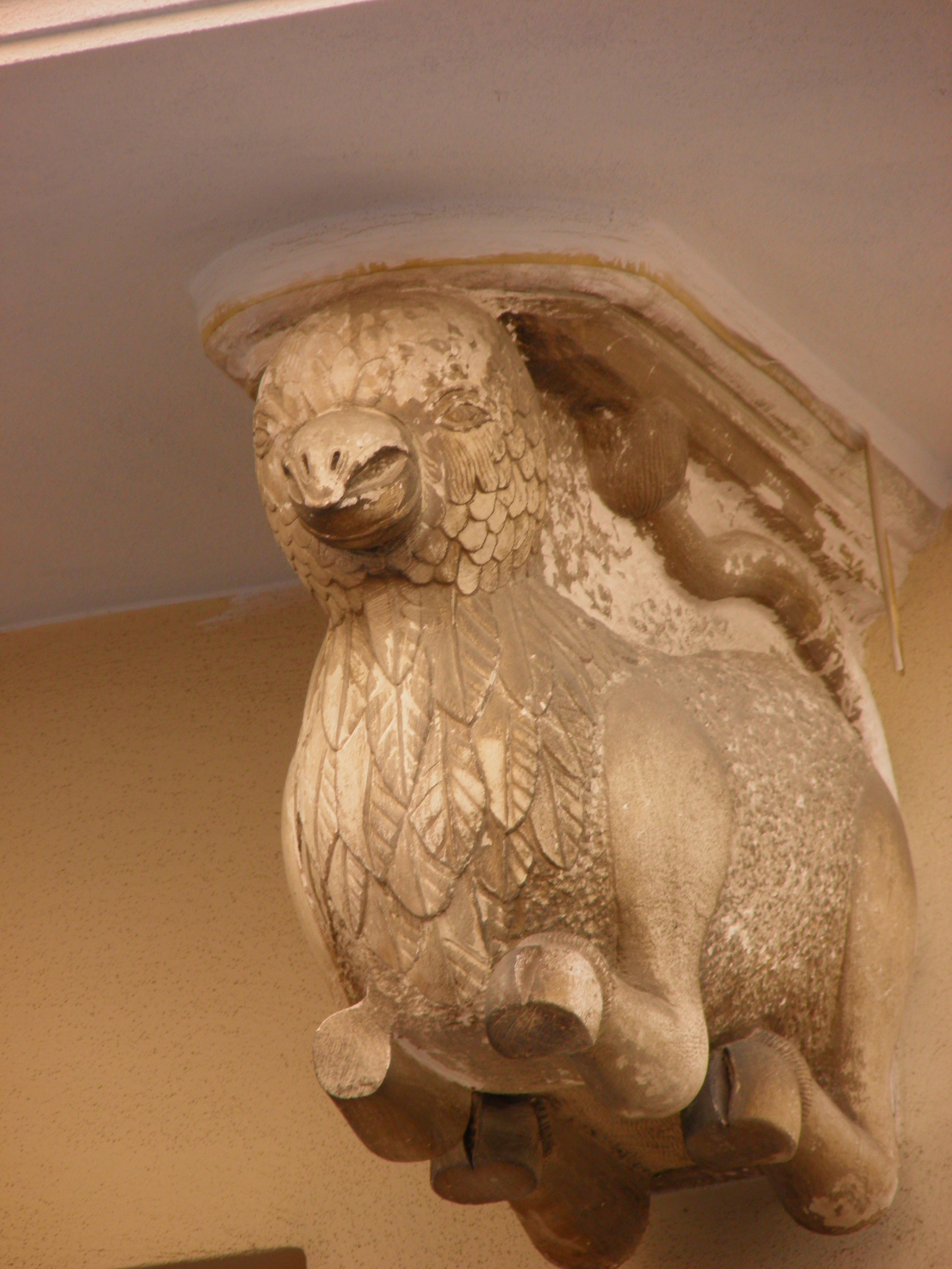 grifone neo-romanico della loggia massonica John Pitkin di Monopoli